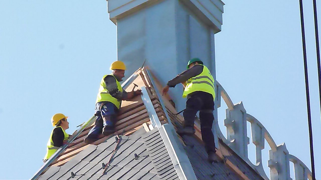 A felvétel 2014. március 1 -én délelőtt készült Budapesten, a Kossuth téren. A Kossuth tér 2 - 4 szám alatti épület felújítása, a kupolák beemelése. Közigazgatási és Igazságügyi Minisztérium.